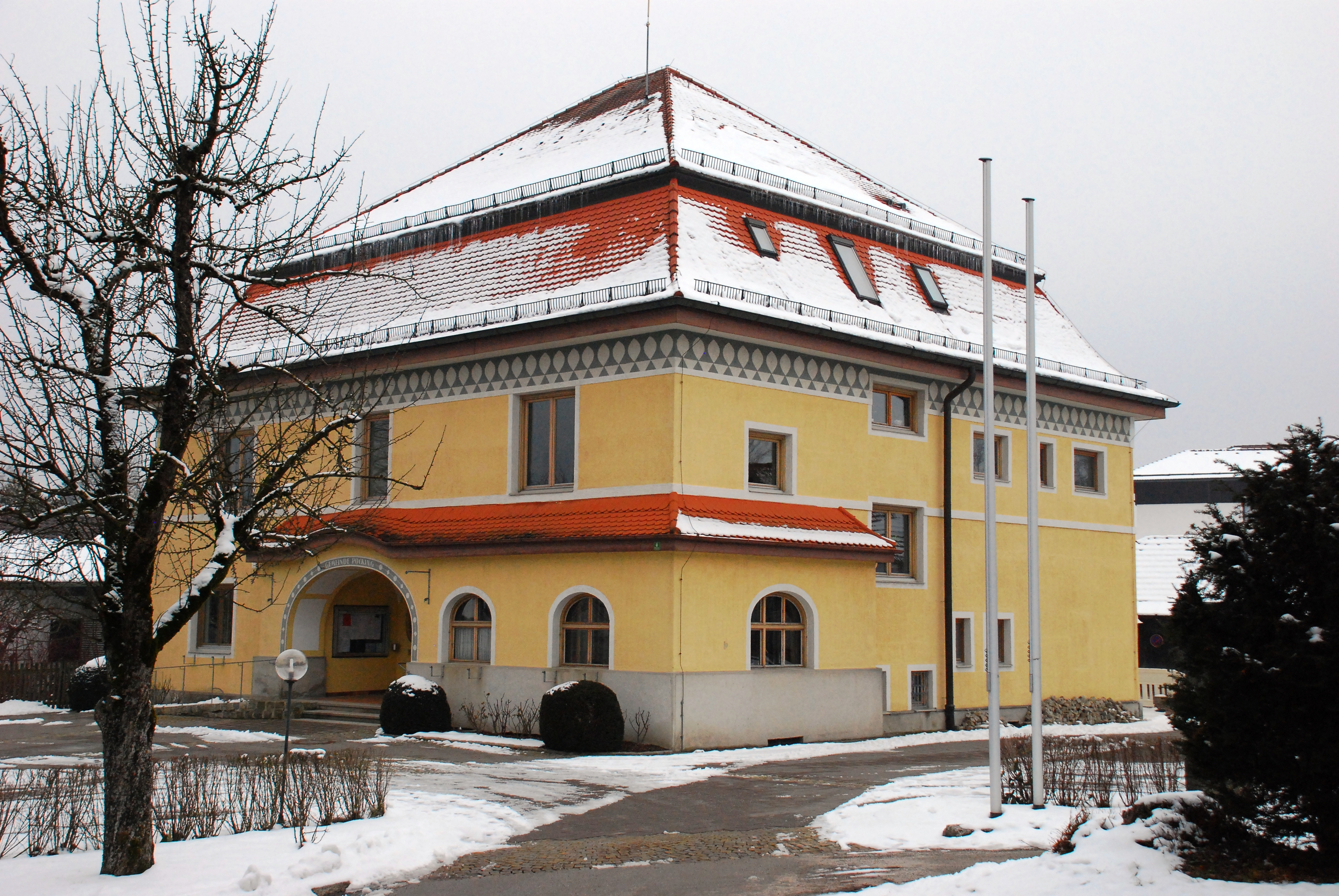 Rathaus der Gemeinde Pöcking, Landkreis Starnberg, Regierungsbezirk Oberbayern, Bayern.